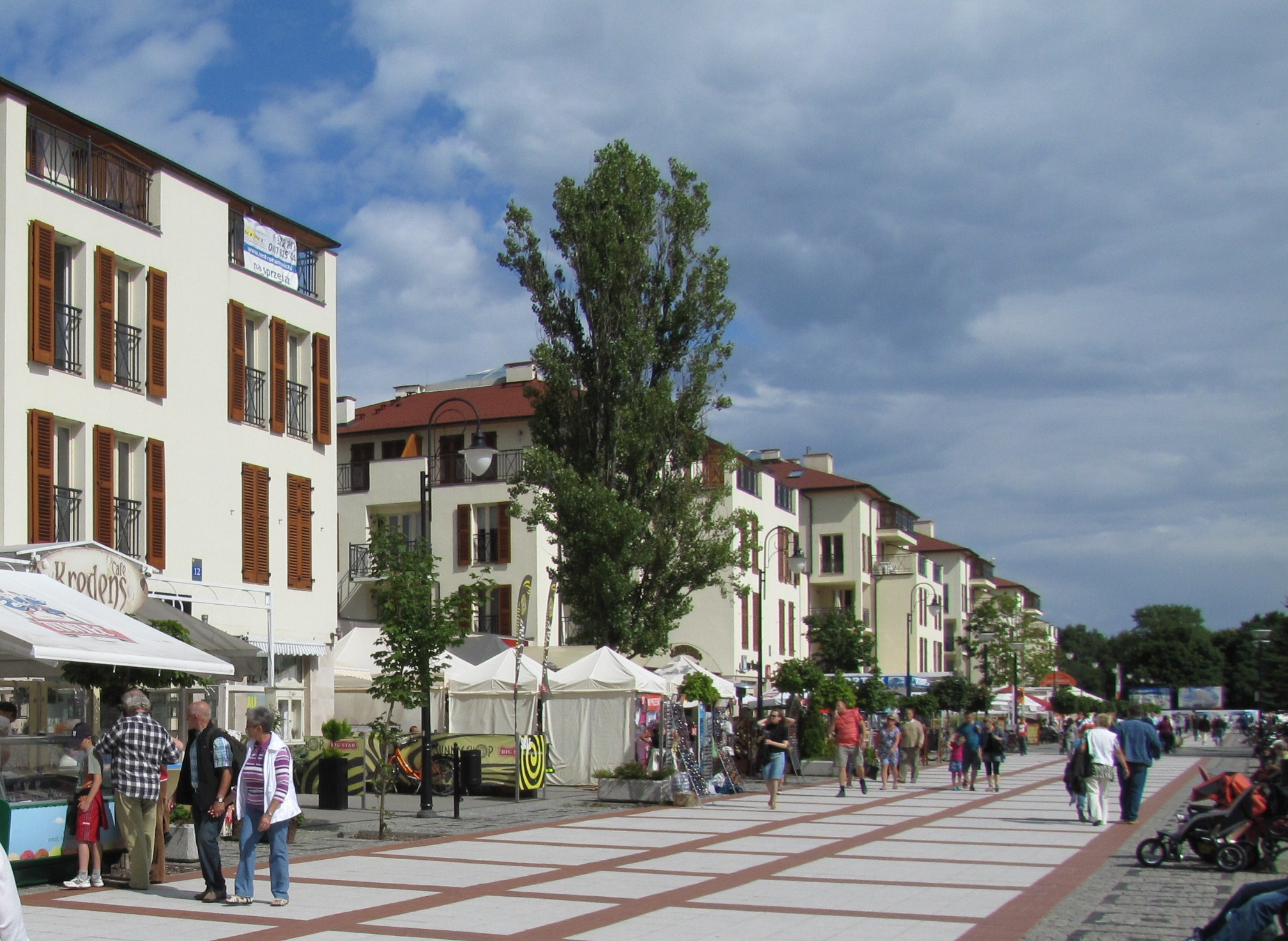 PROMENADA.